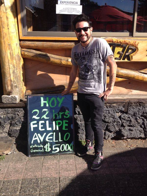 Felipe Avello promocionando su stand comedy en Pucón, Chile.